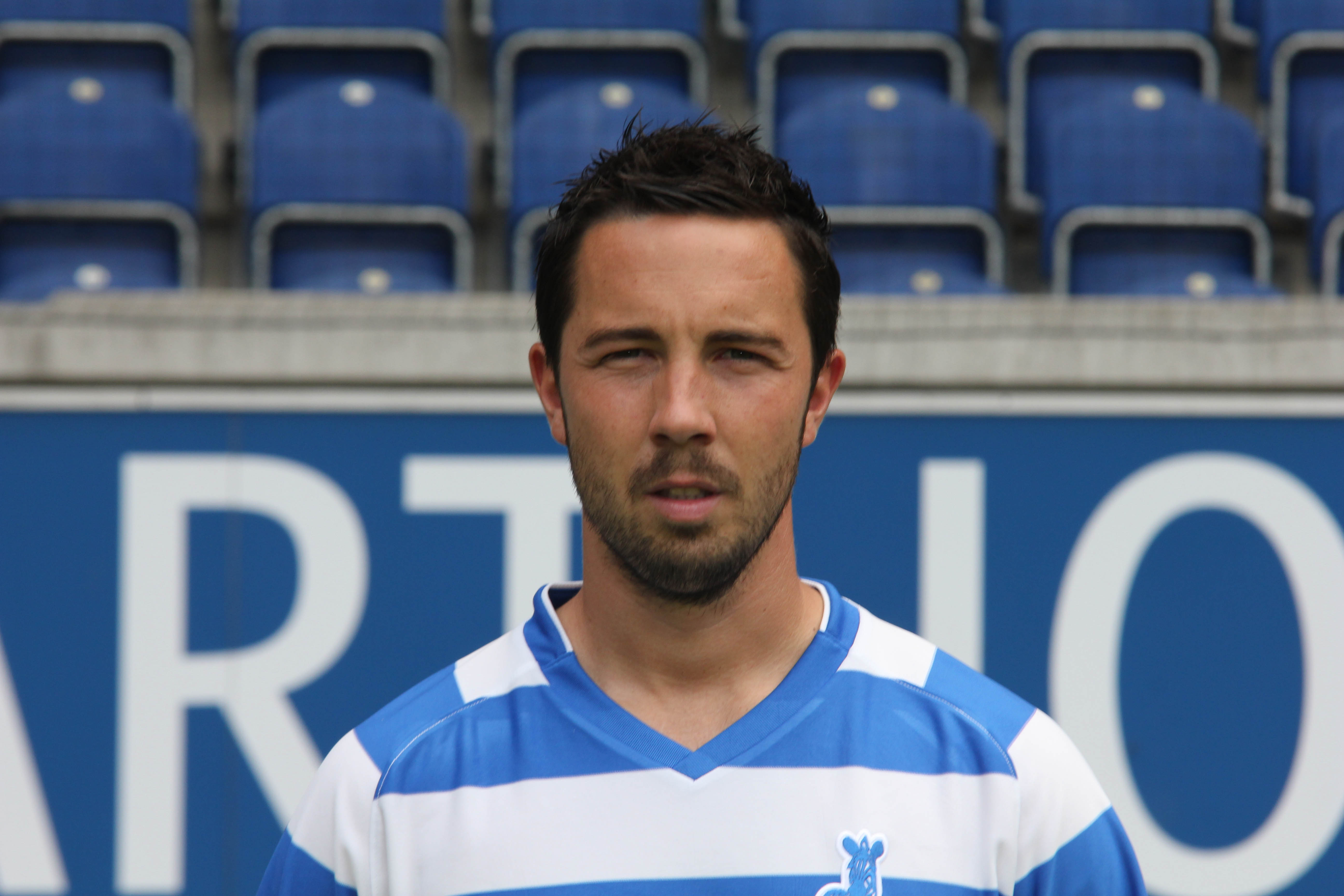 German footballer Benjamin Kern, MSV Duisburg